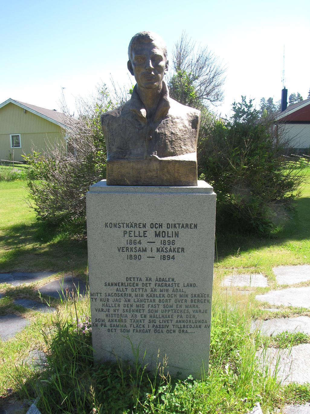 Bronsbyst av Pelle Molin skapad av Carl Frisendahl vid Pelle Molins stuga i Näsåker